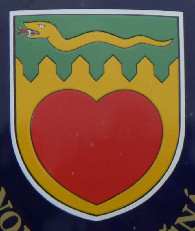 Znak obce Nová Hradečná